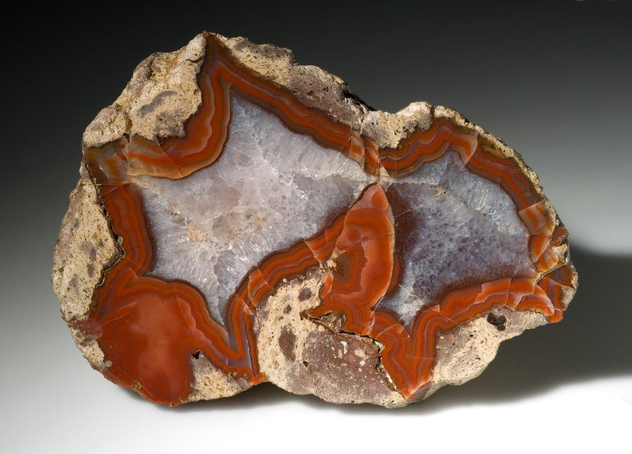 Quarz from the collection of Museum für Naturkunde finding place: Deutschland; Sachsen; St. Egidien; bei Hohenstein-Ernsttal acquisition date: 1977 Weight: 0.459 kg (1.02 lb) donor